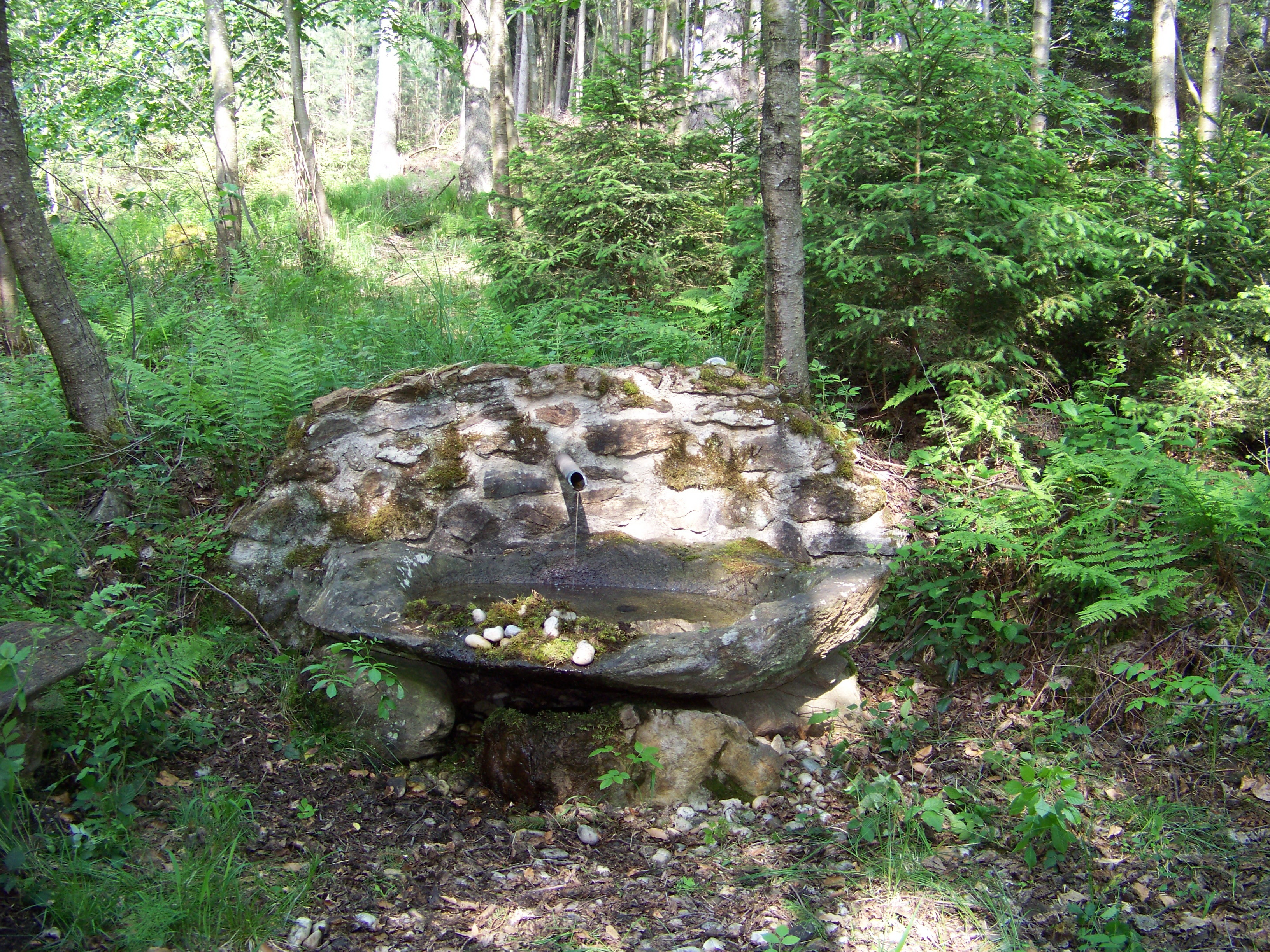 Laberweinting, Hofkirchen, Ellenbach. Kanapeebrunn. 1995 wurden durch das Forstamt Mitterfels zwei Quellen des Ellenbachs gefasst. Das Wasser fließt durch ein Bronzerohr in einen großen Steintrog aus Bayerwaldgranit.